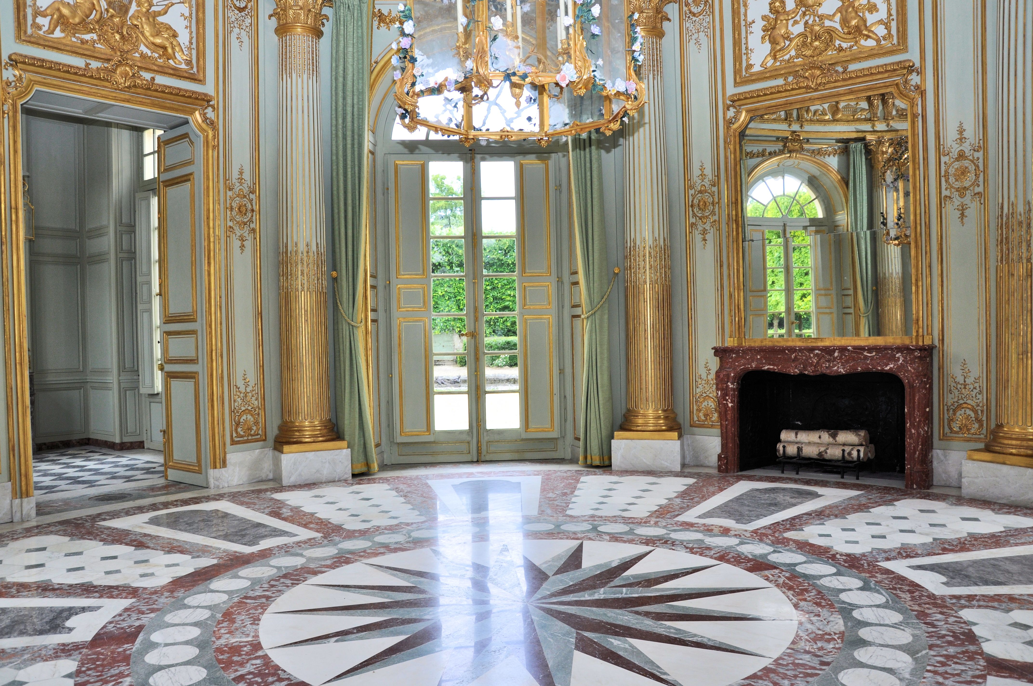 Petit Trianon - Pavillon français - Salon central